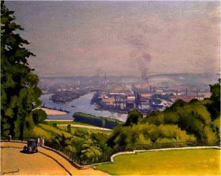 Canteleu, près de Rouen. Après-midi de soleil (c. 1927) Huile sur toile (50 x 61)